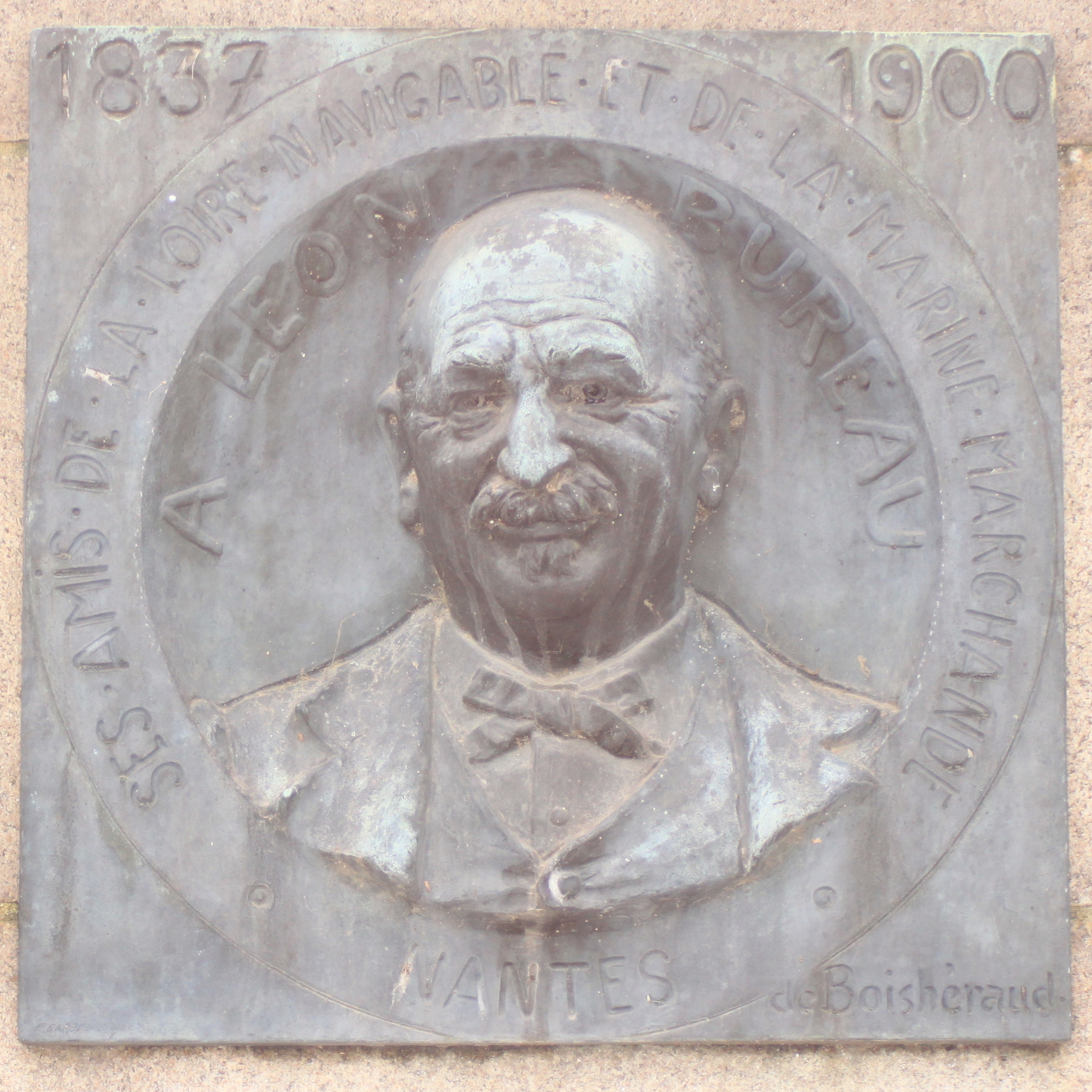 Médaillon de Léon Bureau, réalisé par S. de Boishéraud, cimetière de la Miséricorde, Nantes.